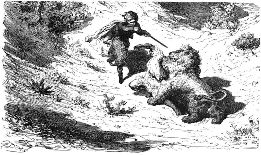 "Je visai à la tempe et je pressai la détente ... le coup ne partit pas."